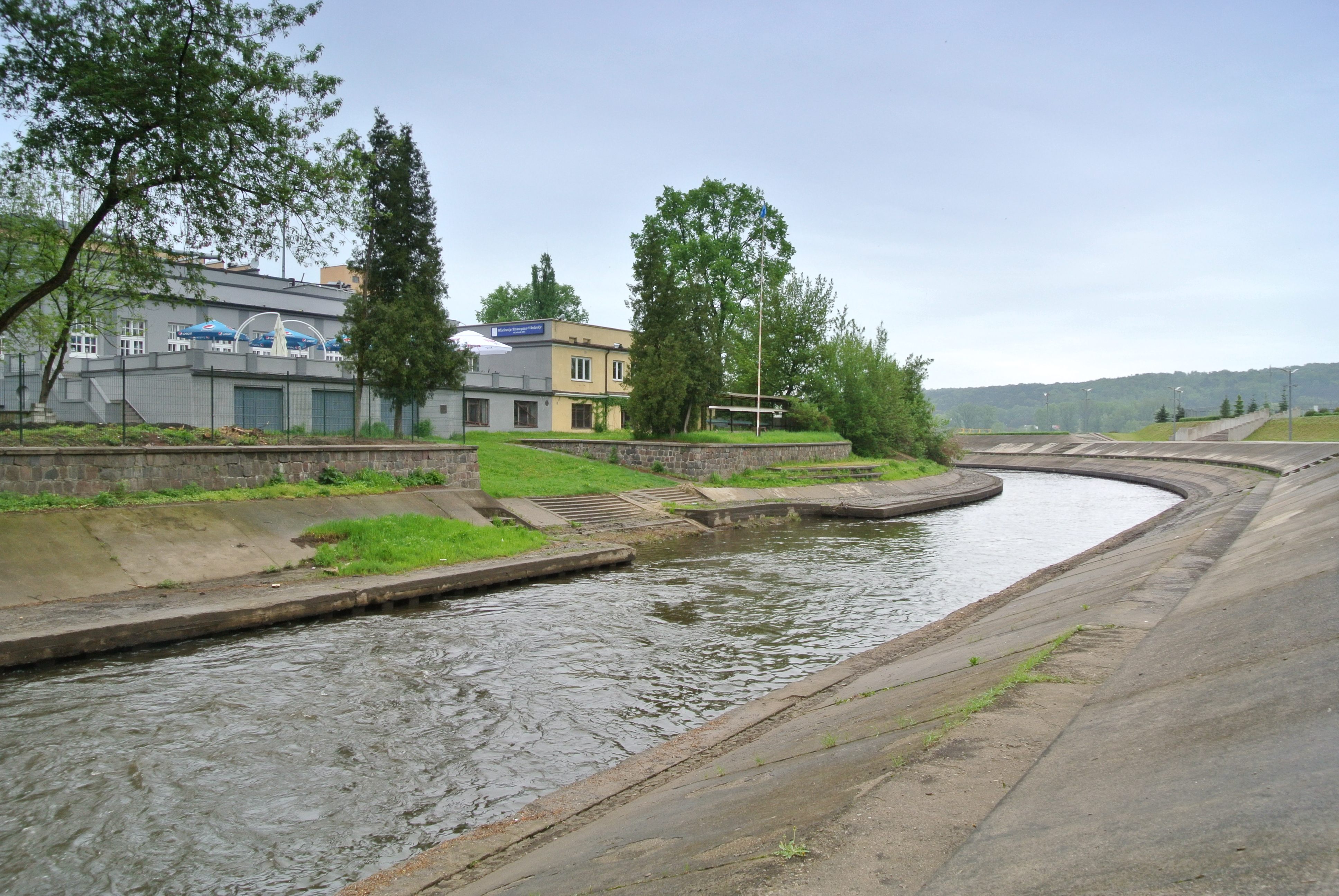 Przystań Włocławskiego Towarzystwa Wioślarskiego